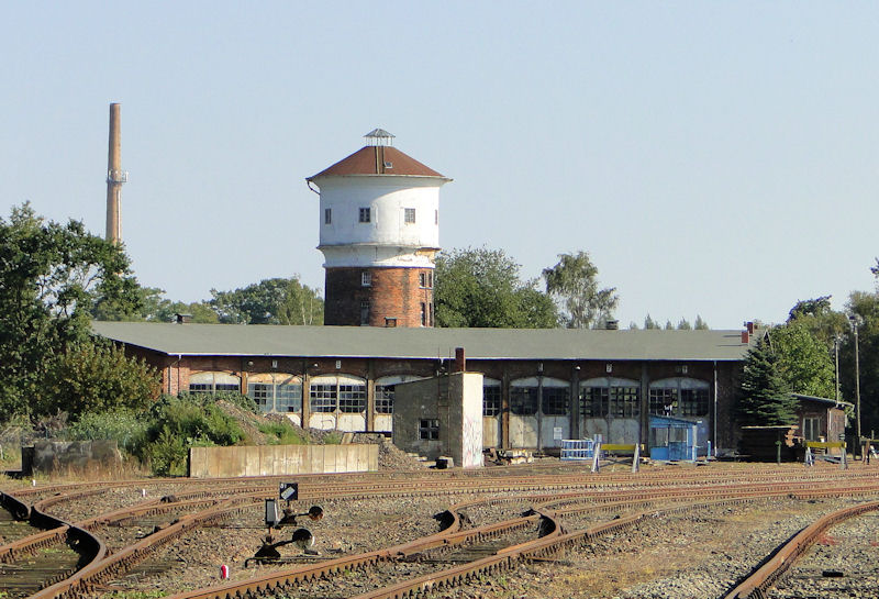 Lokschuppen mit Drehscheibe, dahinter ein Wasserturm nahe dem Ludwigsluster Bahnhof, aus dem fahrenden Zug fotografiert